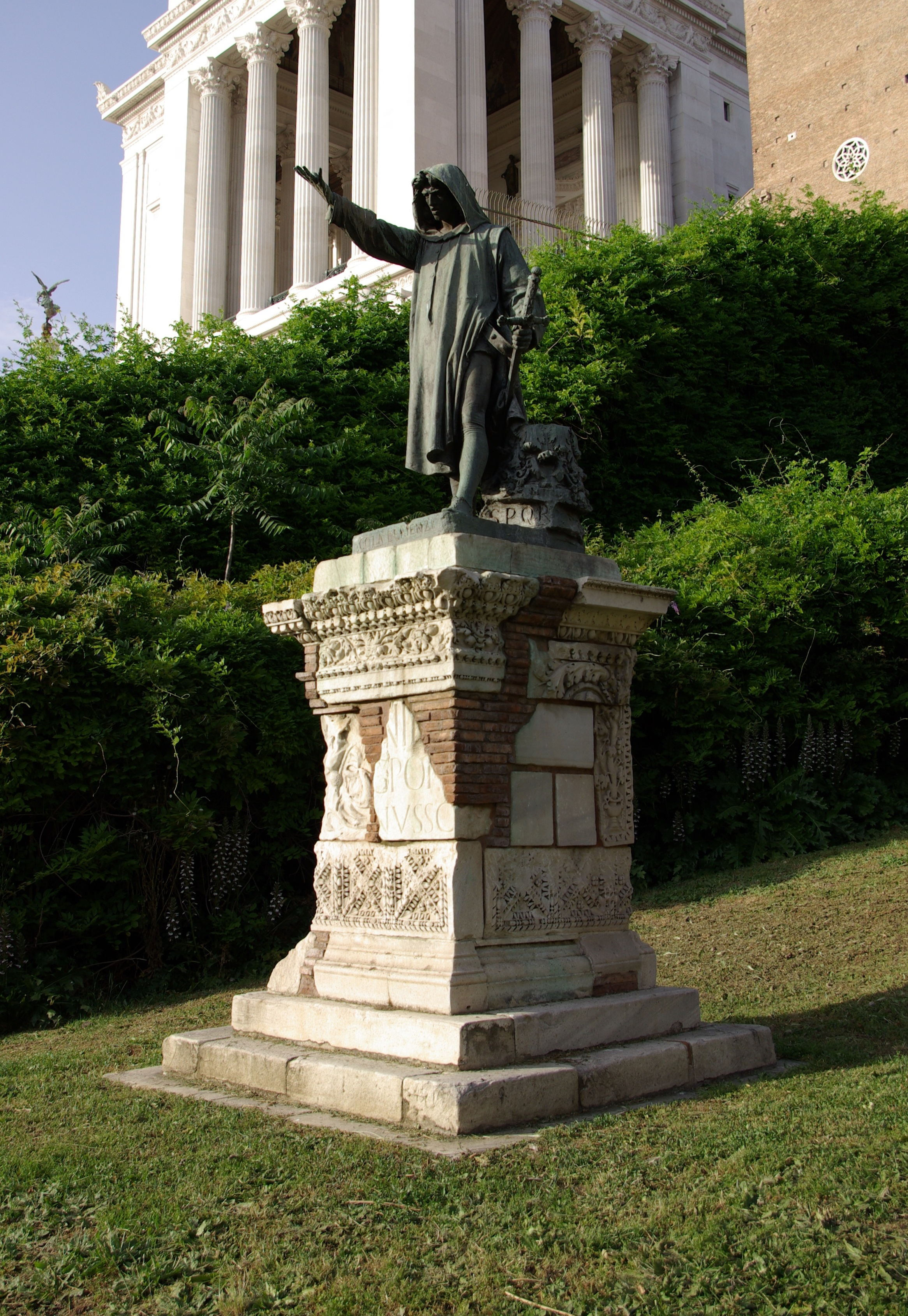 Statue des Cola di Rienzo an der Cordonata in Rom